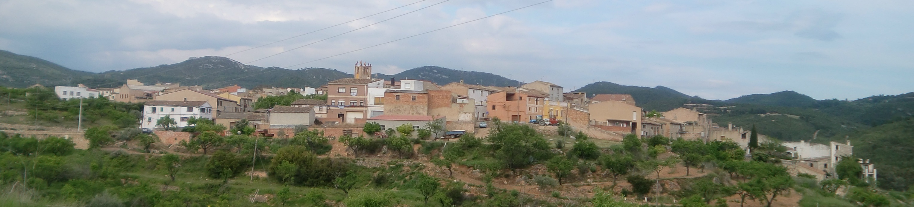 Panoràmica de Les Pobles